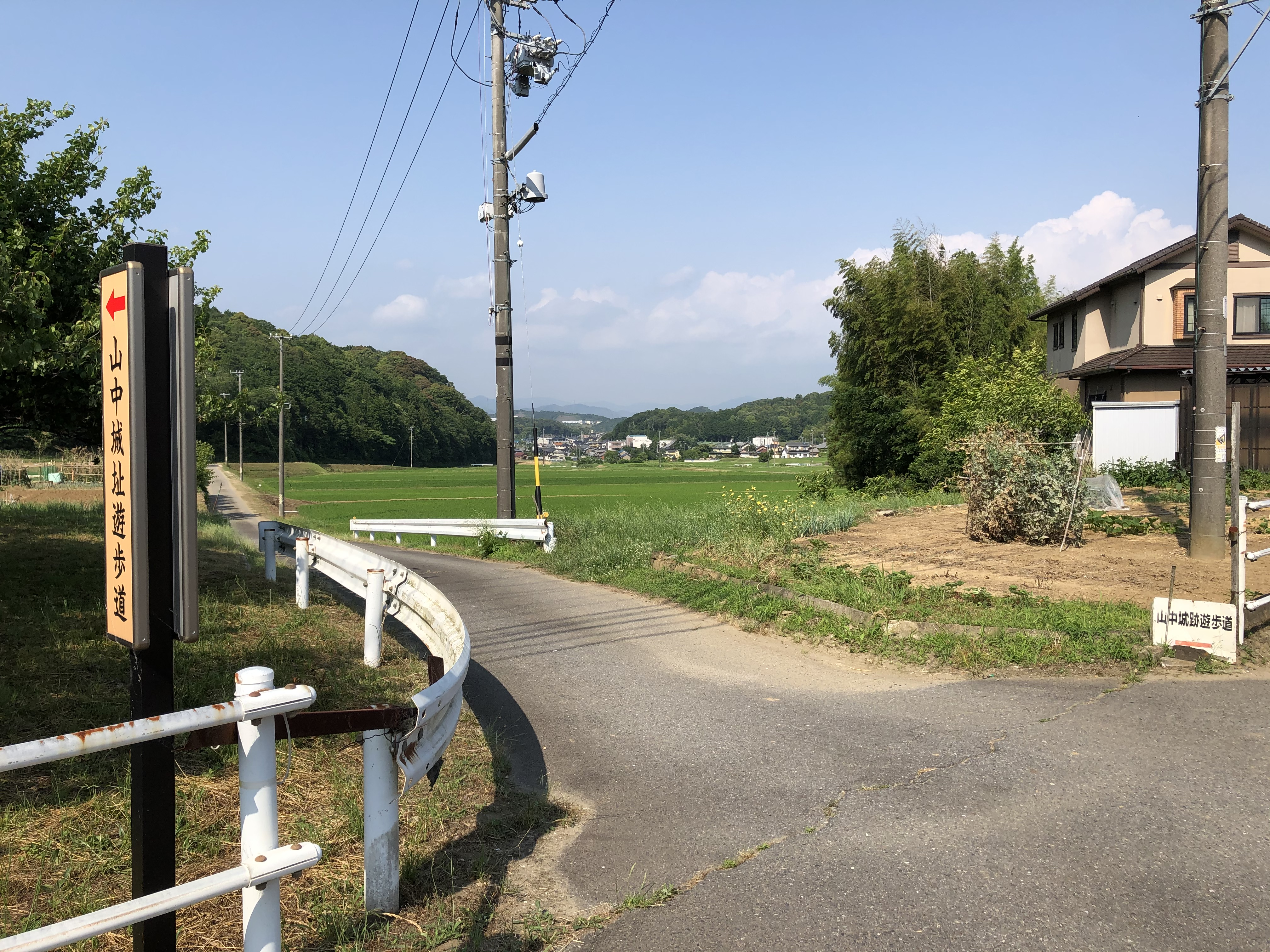 山中城址遊歩道入口（岡崎市羽栗町）